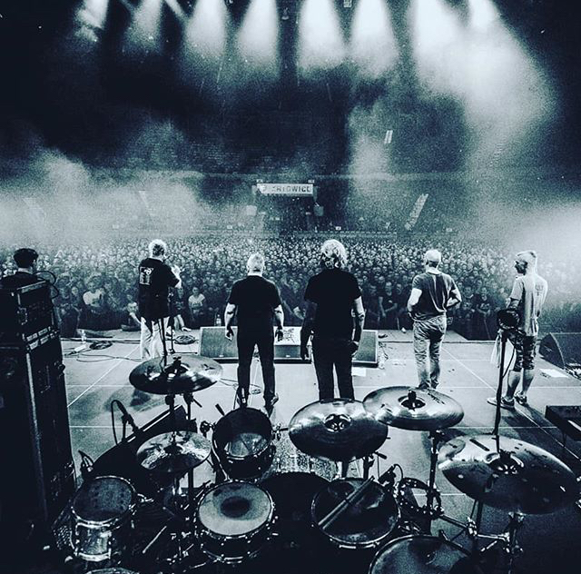 Koncert zespołu Kult Katowice Spodek